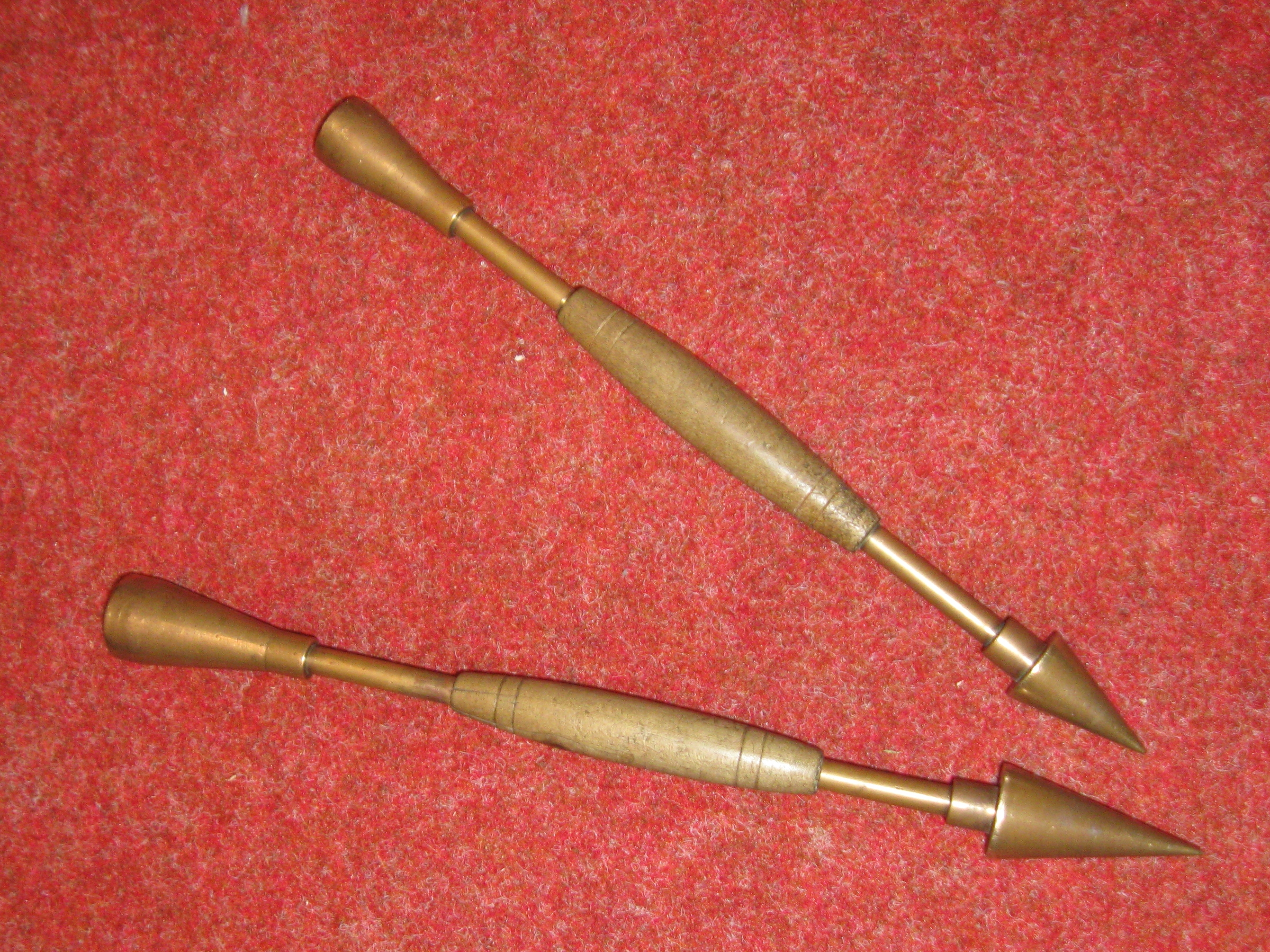 Zwei Stimmhörner, wie sie ein Orgelbauer zum Stimmen von Orgelpfeifen verwendet.